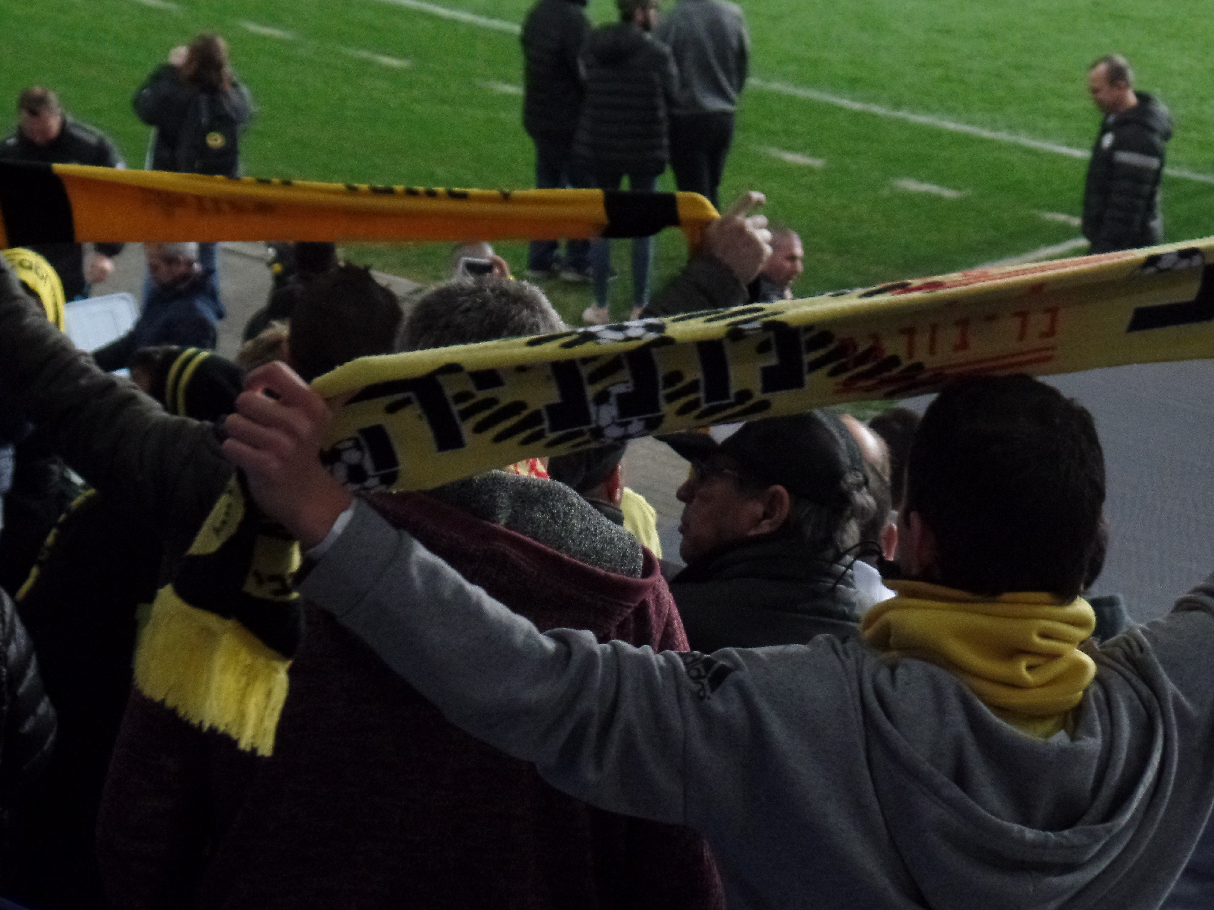 אוהדי מכבי נתניה ביציע, 2018